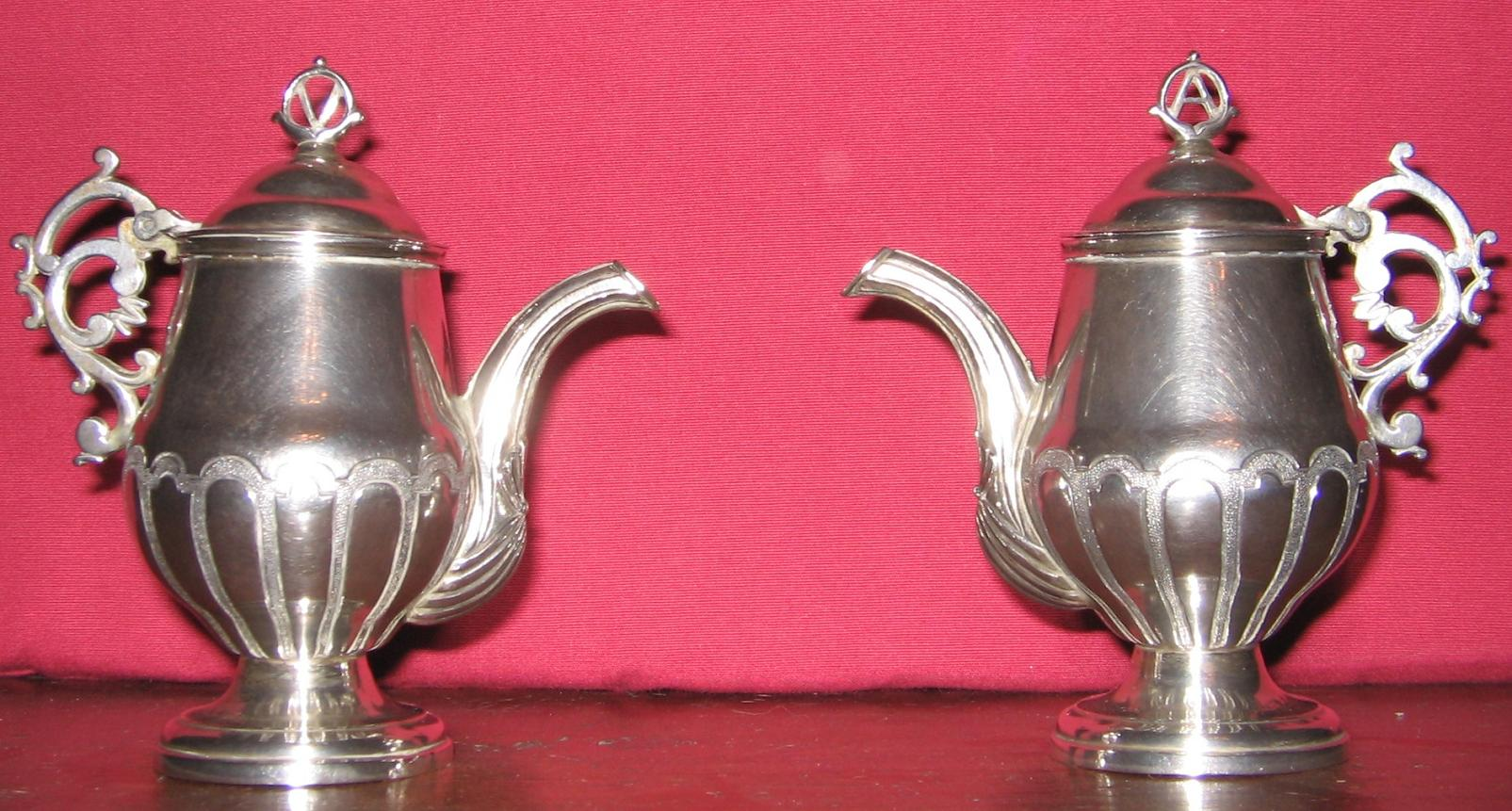 Vinajeras Plata lisa, la cápsula inferior muestra al exterior decoración avenerada. Sin Punzón